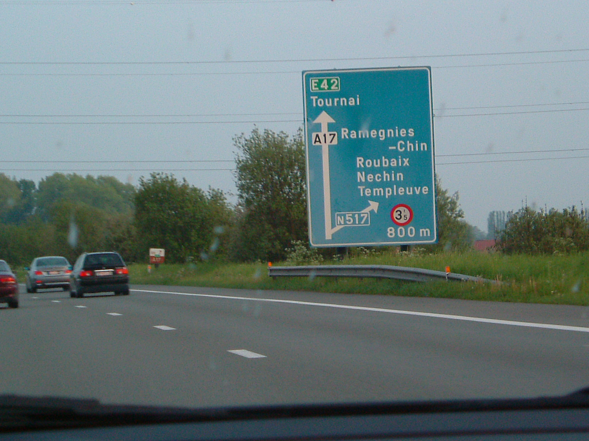 Photo de la sortie de la A 17 à Templeuve par Vascer